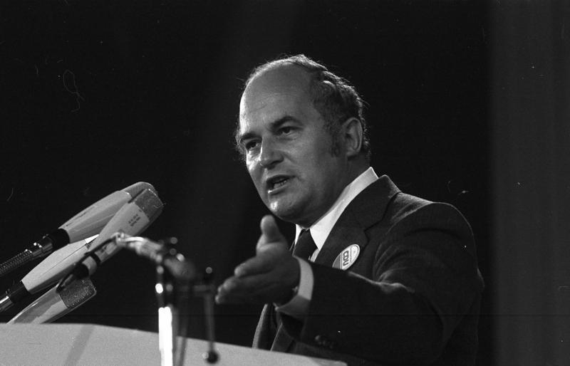 CDU-Parteitag 1972 in der Wiesbadener Rhein-Main-Halle. (Rainer Barzel) 9.-11.10.1972